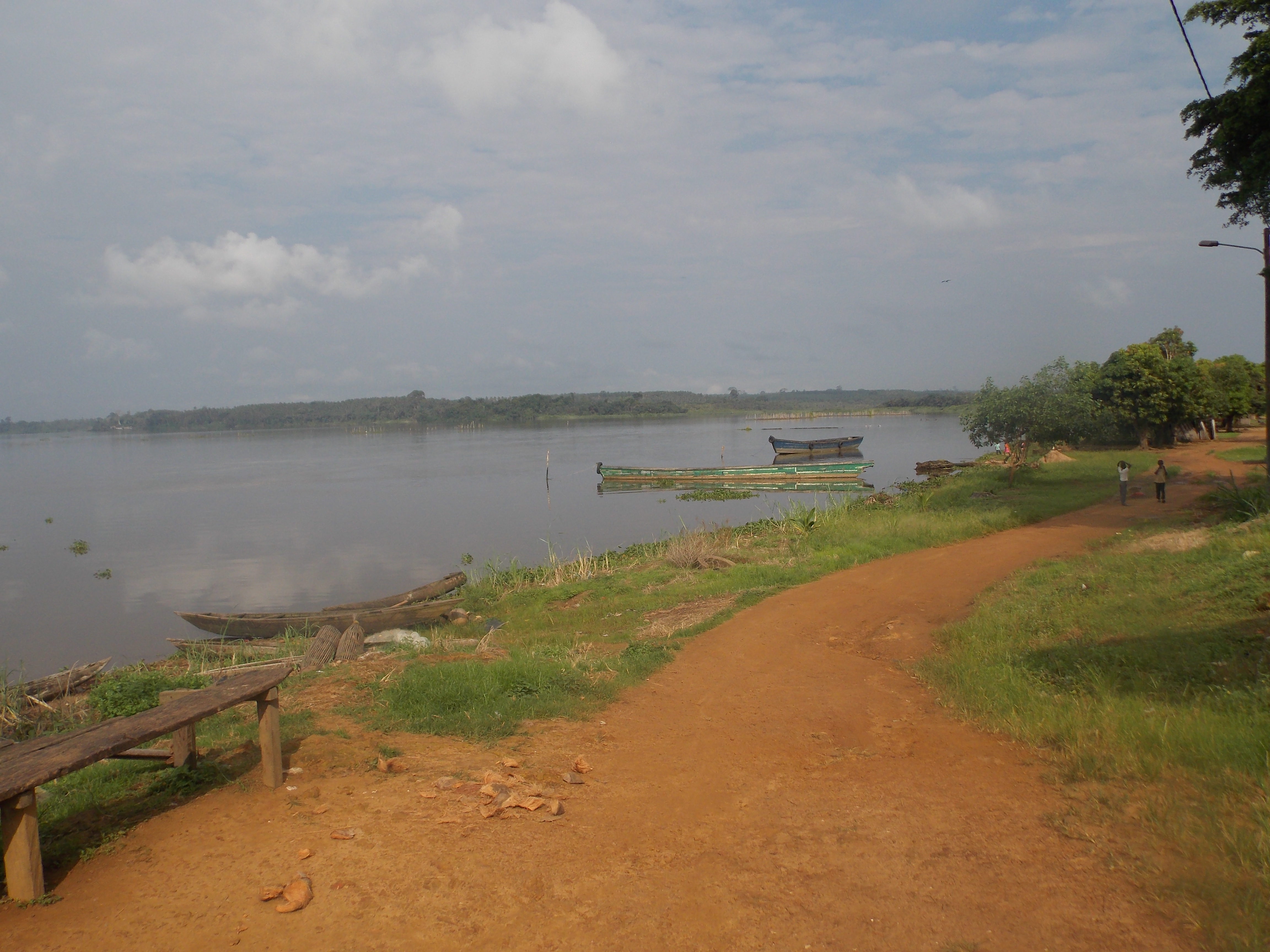 une vue de la Lagune d'Aby